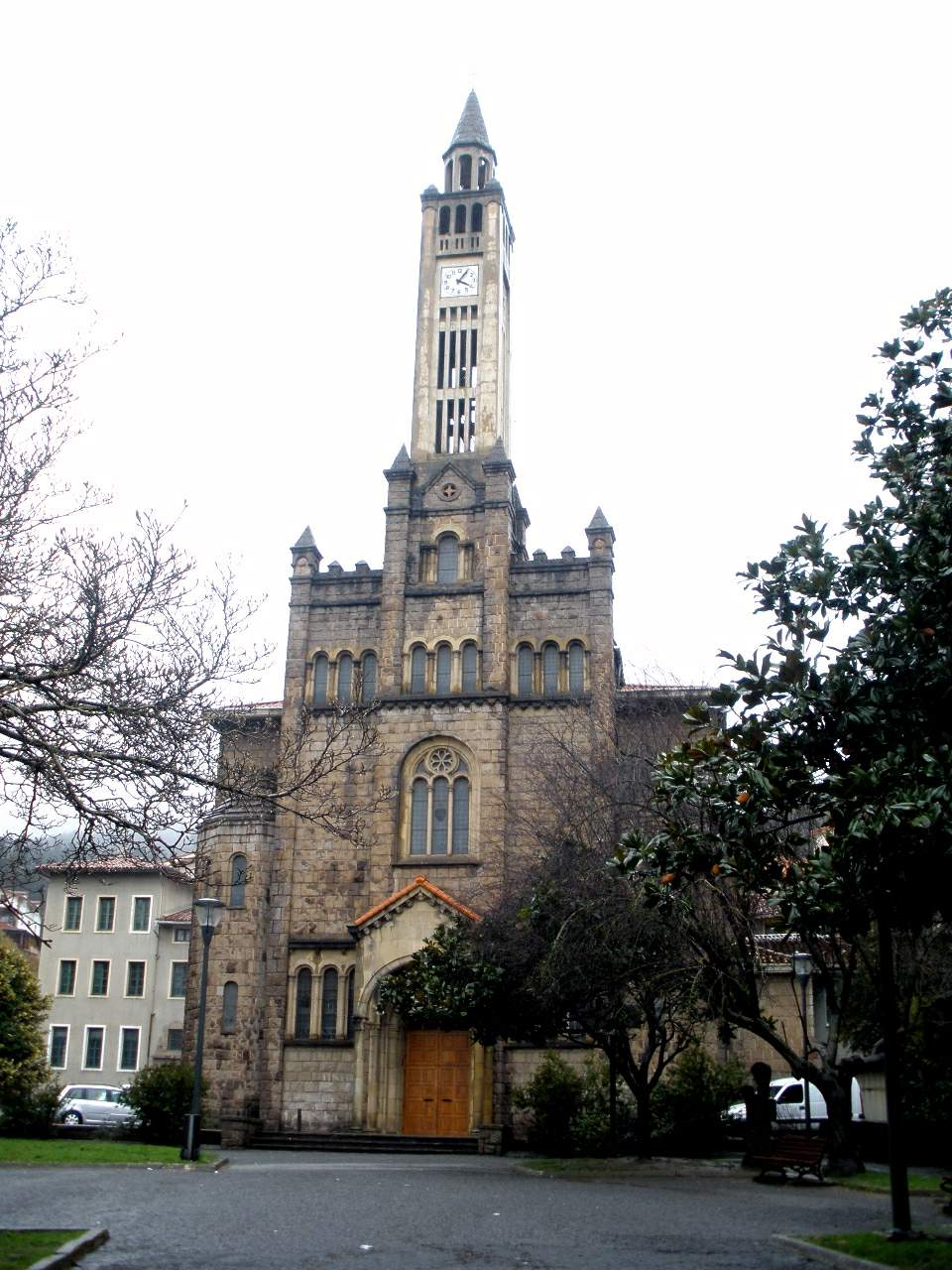 Iglesia de Nuestra Señora de Lourdes (Urretxu, Gipúzkoa)